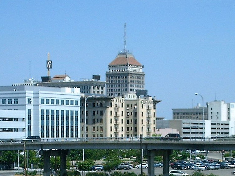 Fresno Skyline